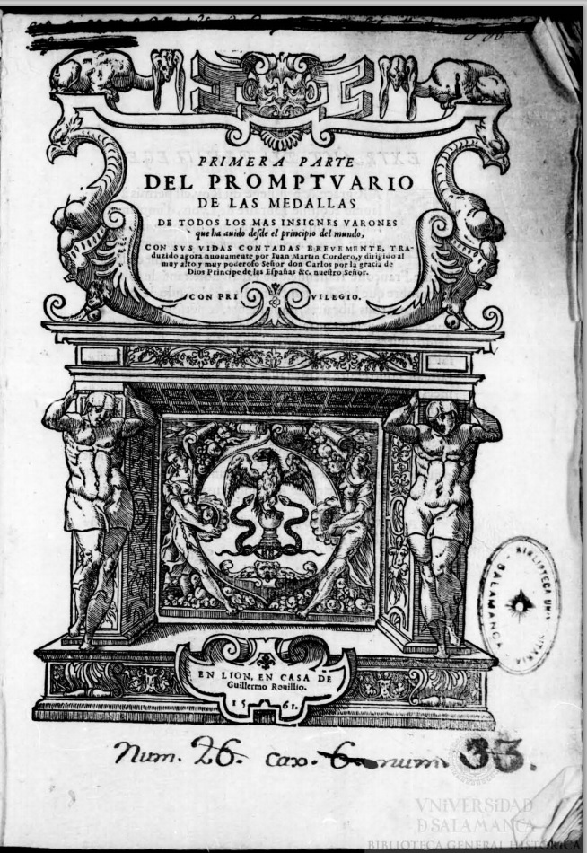 Portada del "Promptuario de las medallas de todos los mas insignes varones que ha auido desde el principio del mundo, con sus vidas contadas breuemente" de Guillaume Rouillé, traduït al castellà per Joan Martí Cordero.En Lion : en casa de Guillermo Rouillio, 1561.